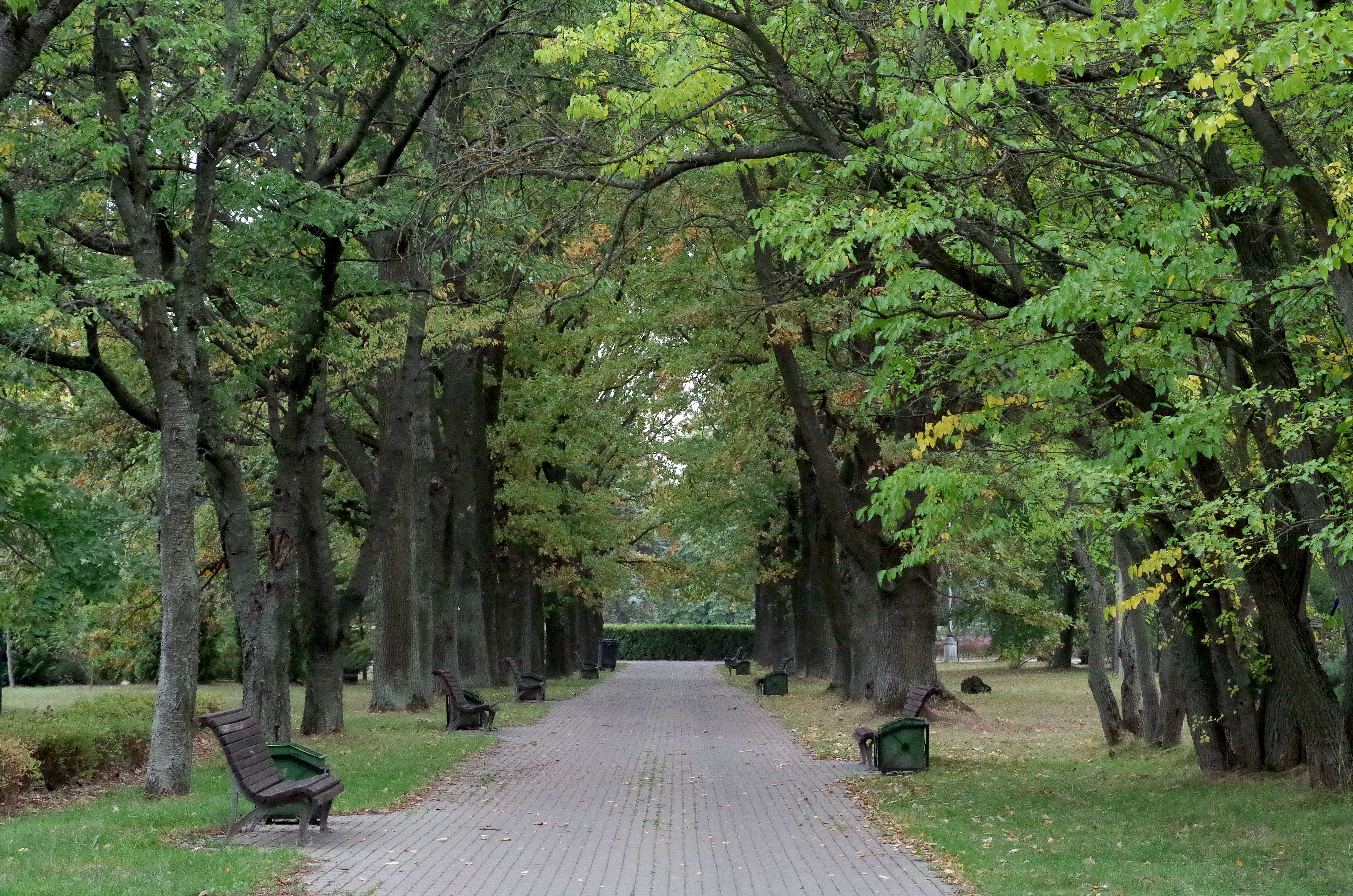 Алея дуба чарэшчатага